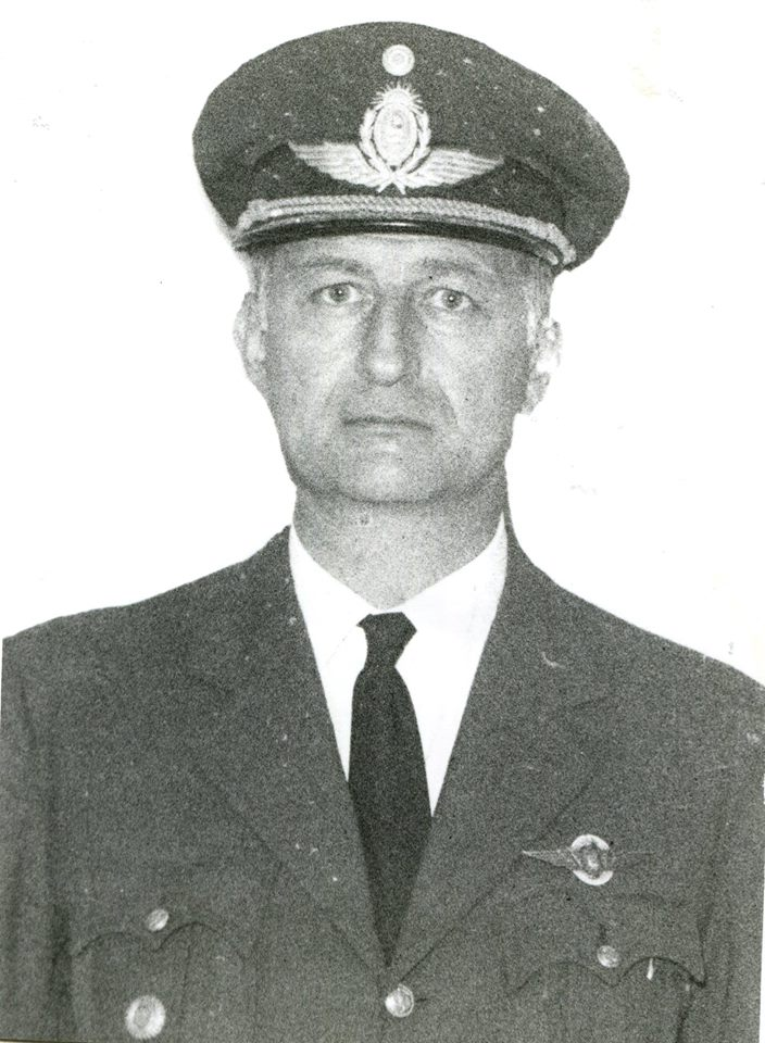 El Brigadier General Heriberto Ahrens.